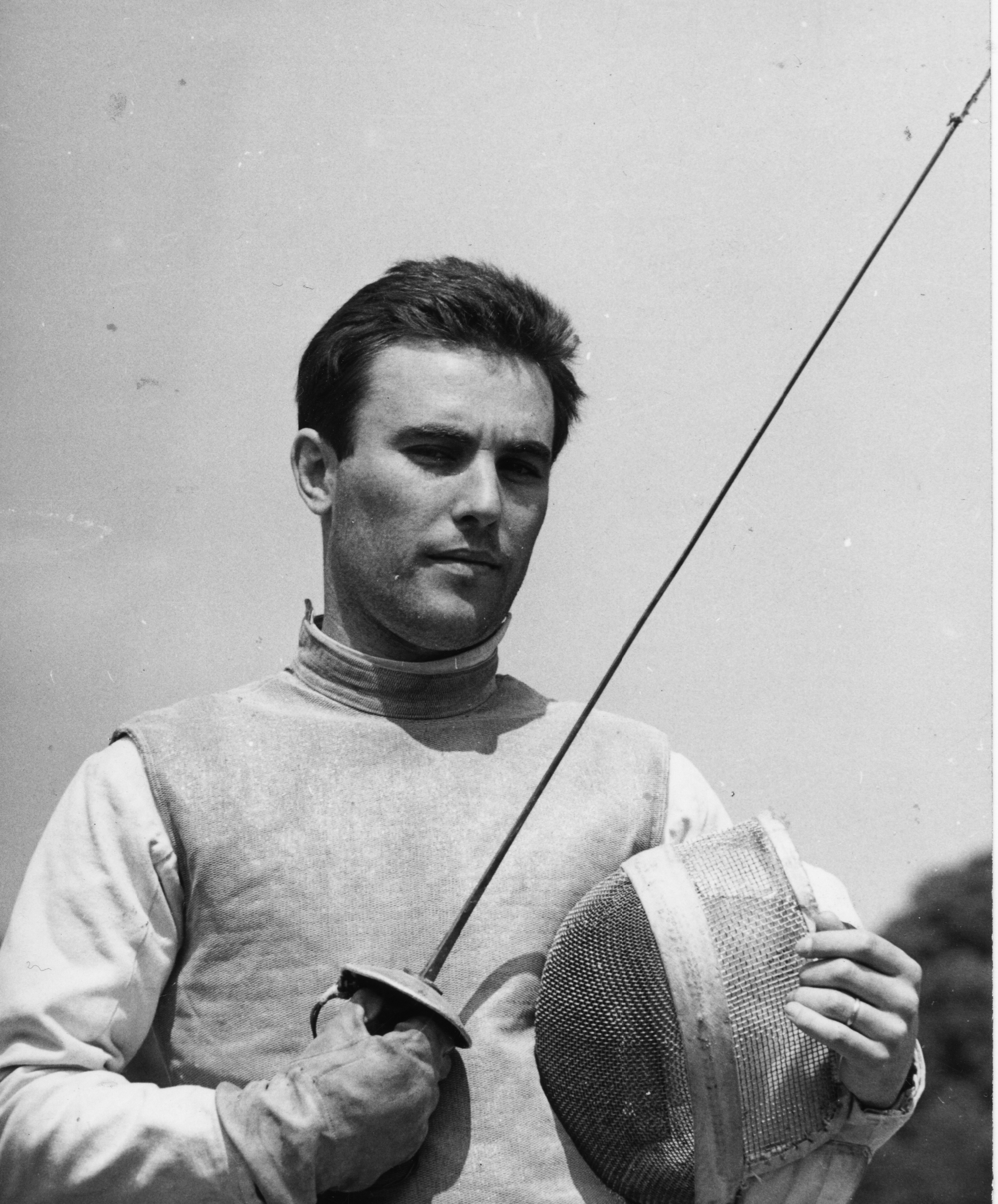 Kamuti Jenő olimpiai ezüstérmes tőrvívó.